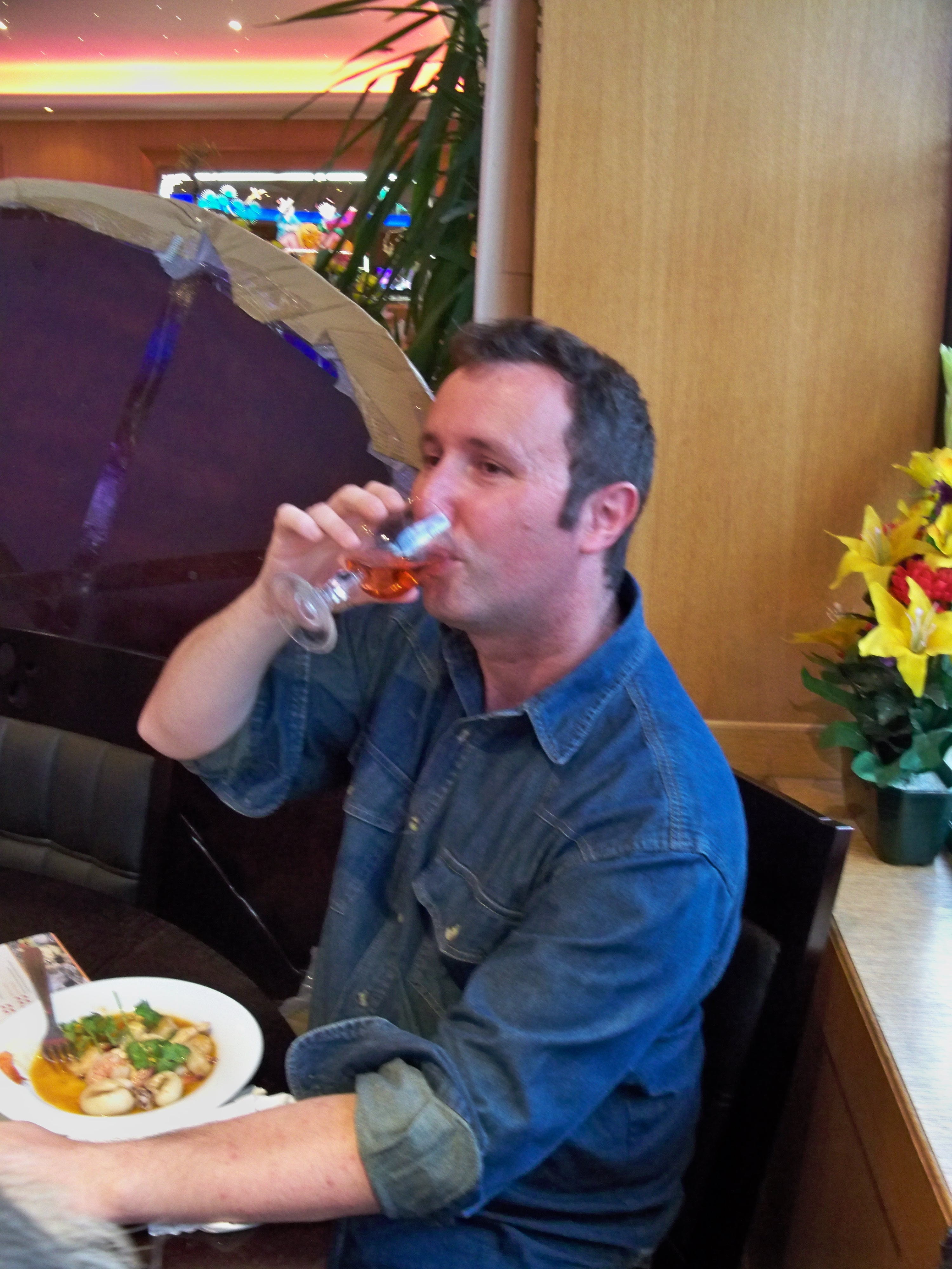 Dégustation de vin